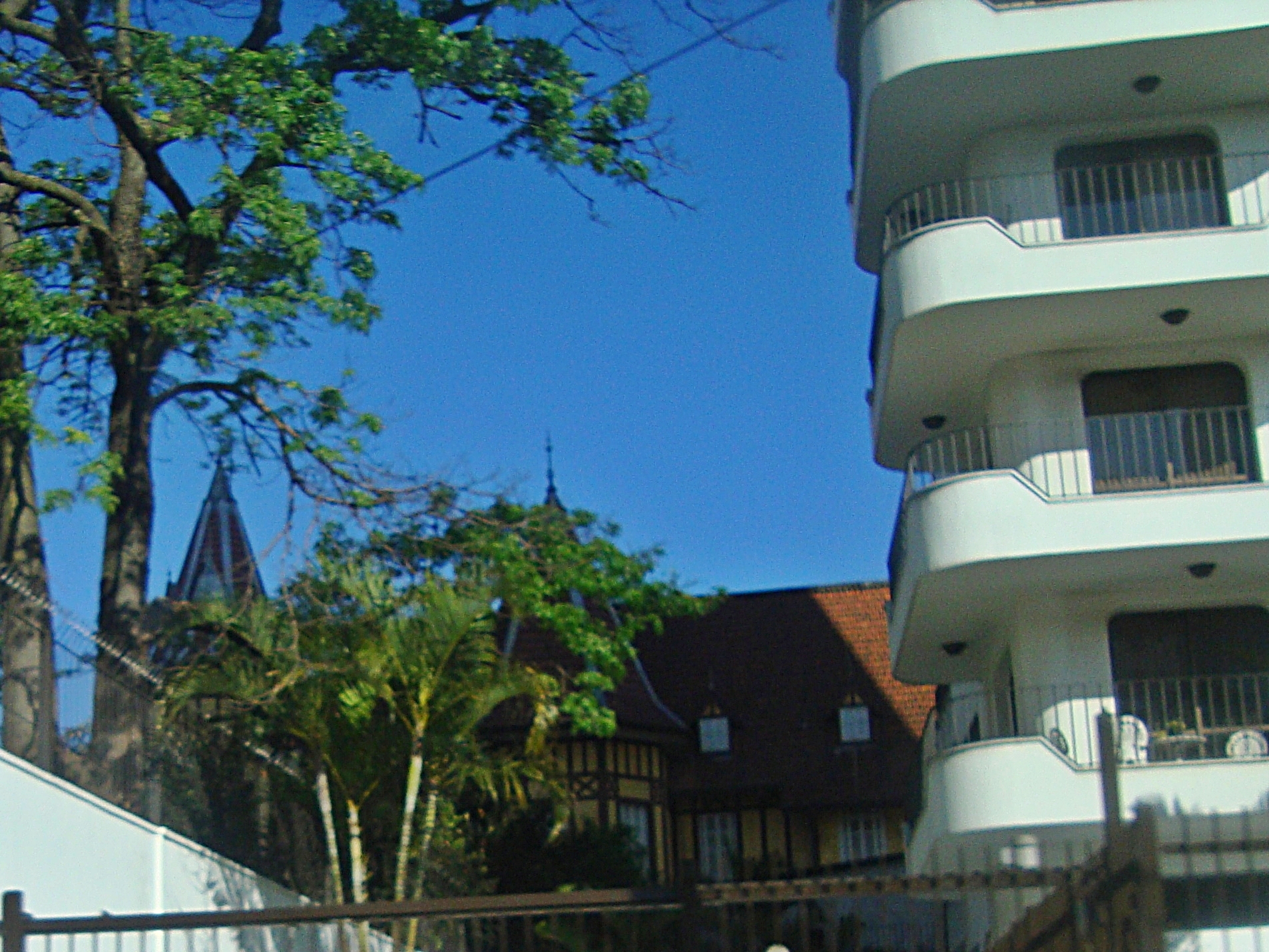 Foto da região e do Palacete Baruel em santana São Paulo - SP